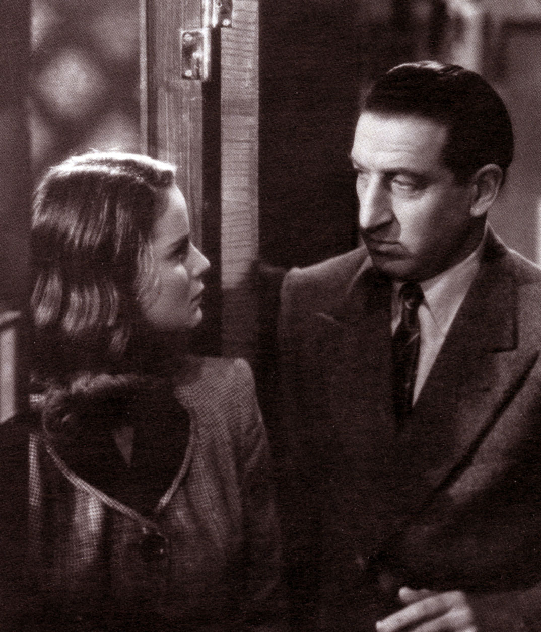 Alida Valli e Carlo Ninchi in Catene invisibili